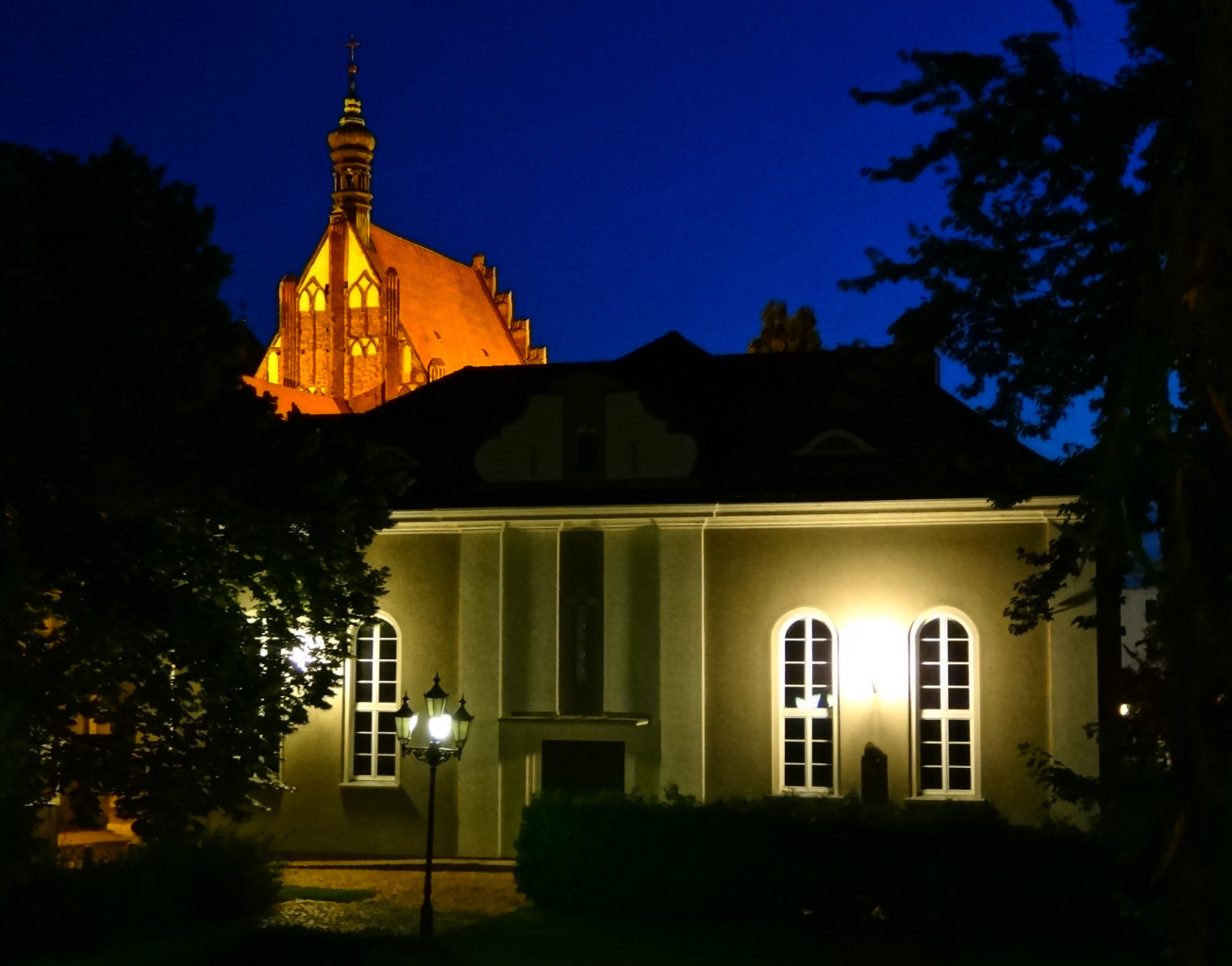 Dom Katolicki w Bydgoszczy przy katedrze (ul. Malczewskiego)